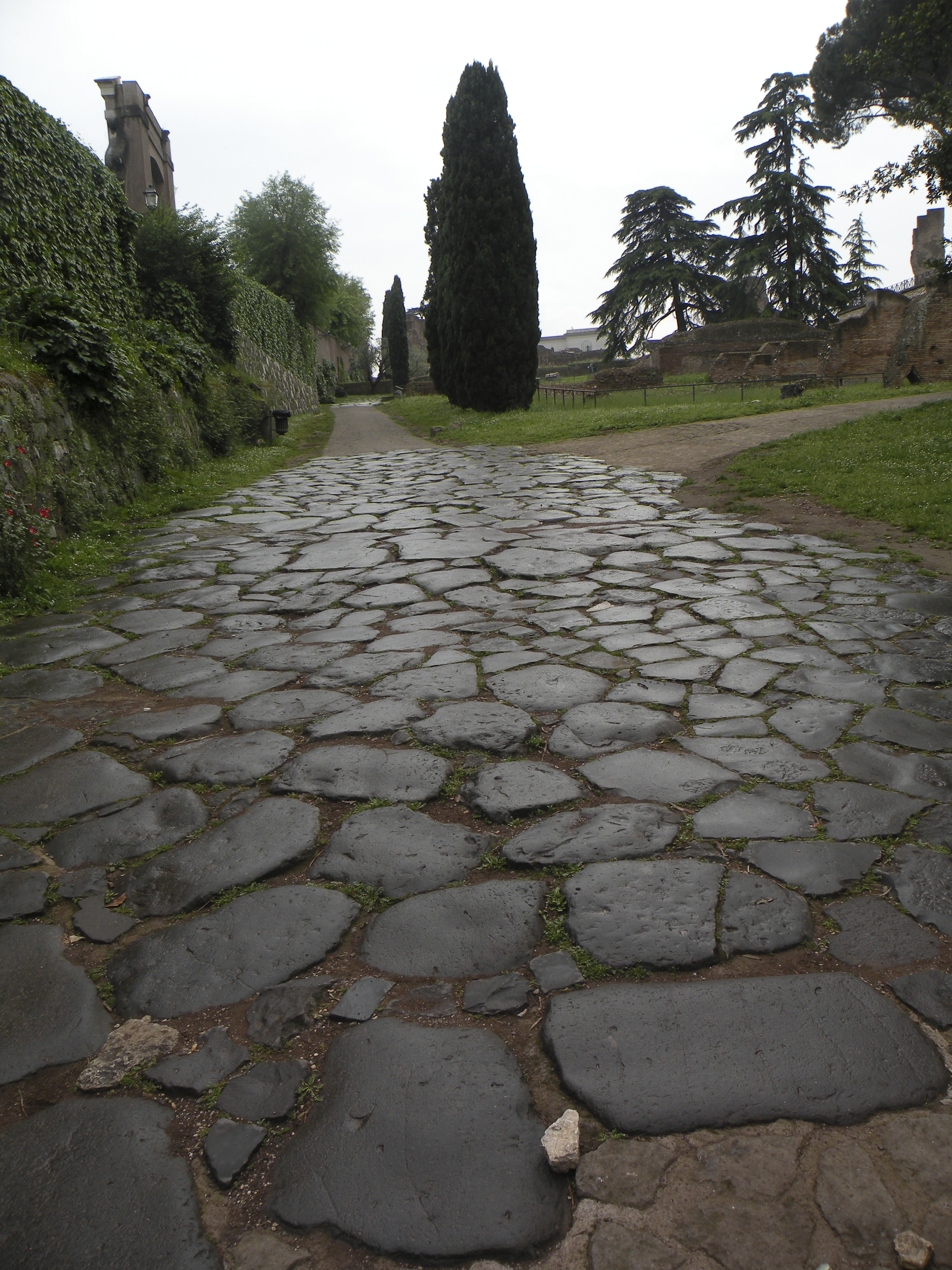 Palatine Hill. Pavement.